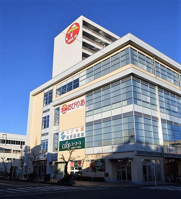 静岡県島田市にある複合商業施設「おび・りあ」。食品スーパー、FM島田サテライトスタジオ、島田市立島田図書館が入っており、上階はマンションとなっている。